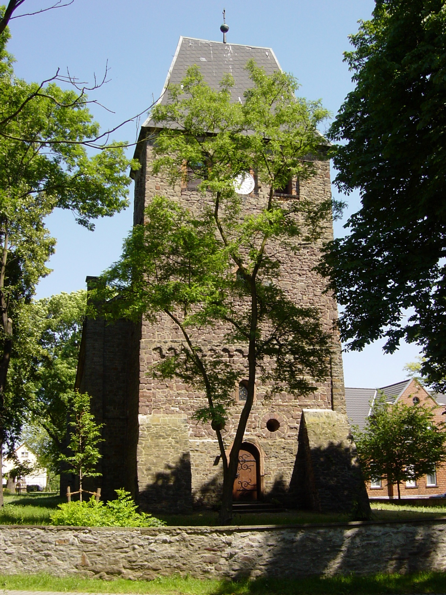 Evangelische Kirche St. Lamberti in Dahlenwarsleben